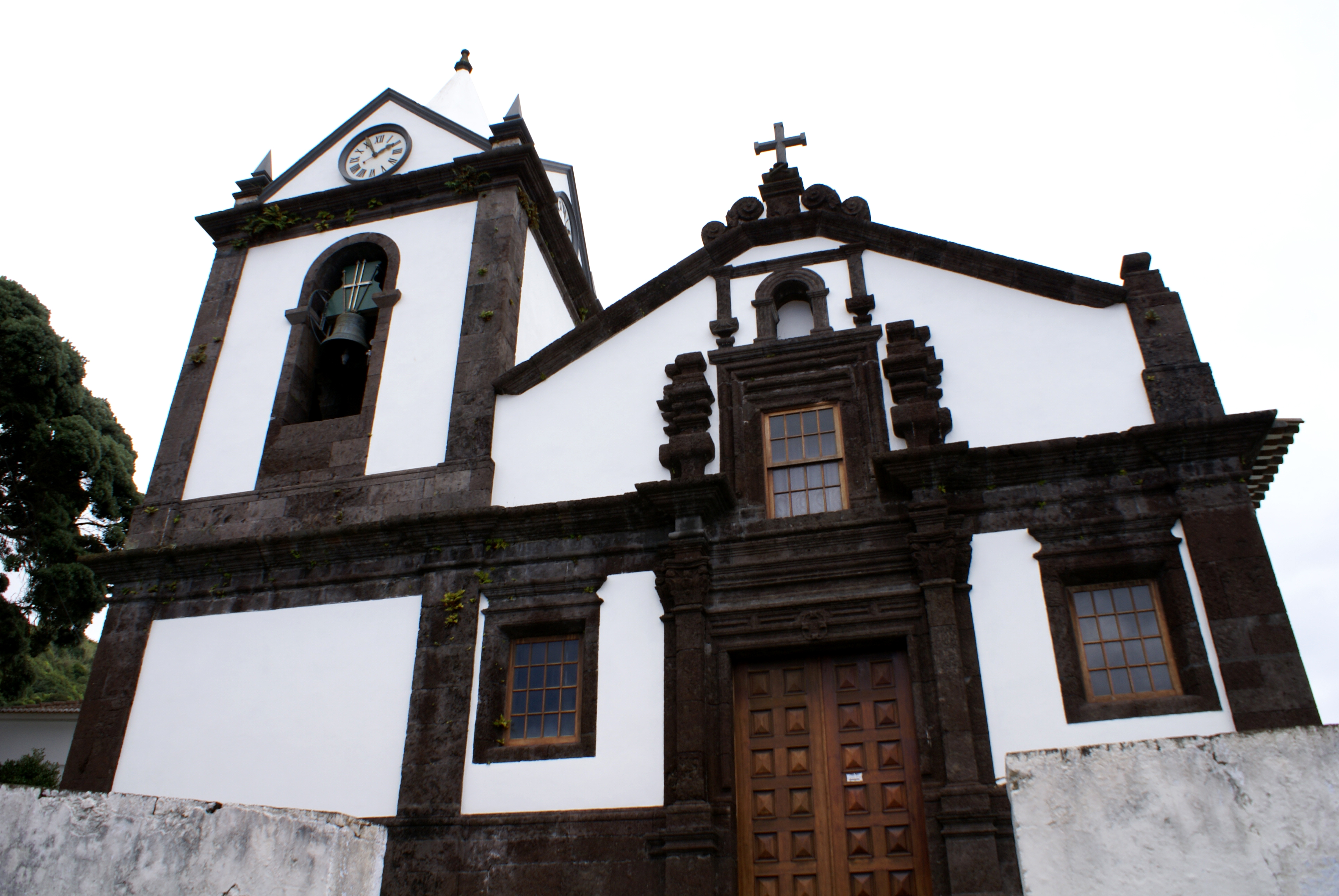 Igreja de Santa Catarina, fachada, Calheta, ilha de São Jorge, Açores